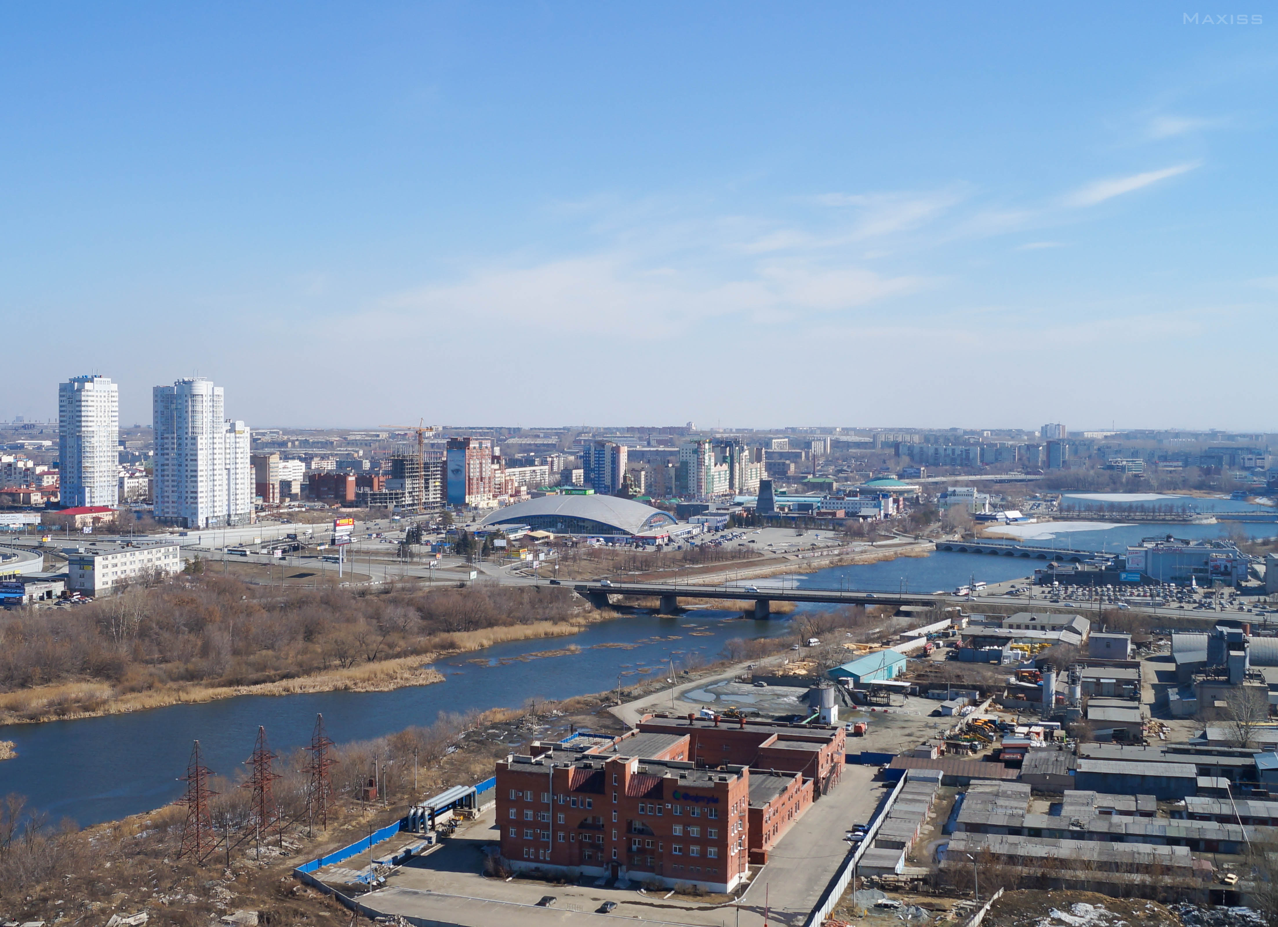 река Миасс в городе Челябинске ниже Шершнёвского водохранилища